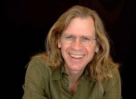 Eric Walter Rothenbuhler portrait